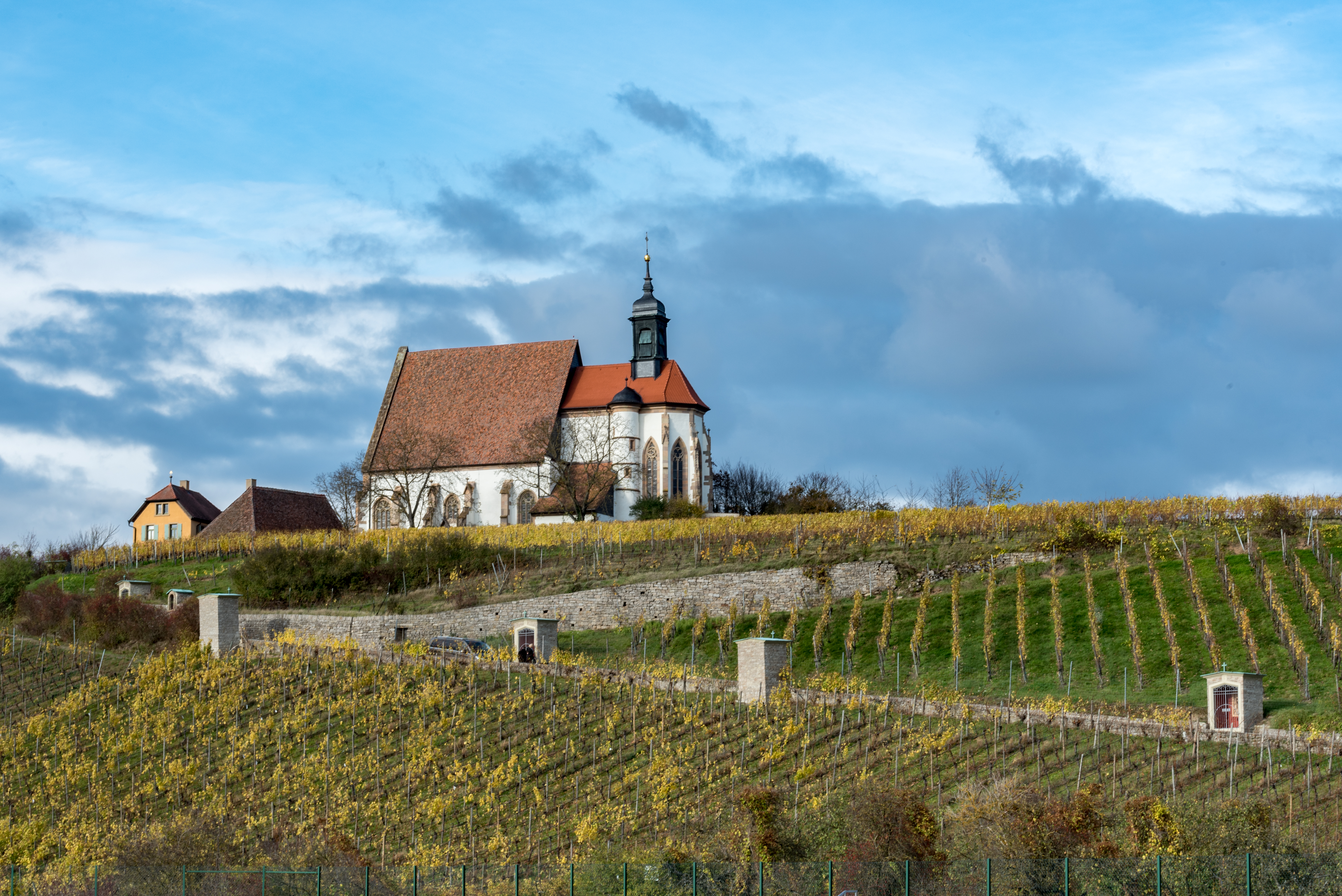 Volkach, Kirchbergweg 20, Wallfahrtskirche